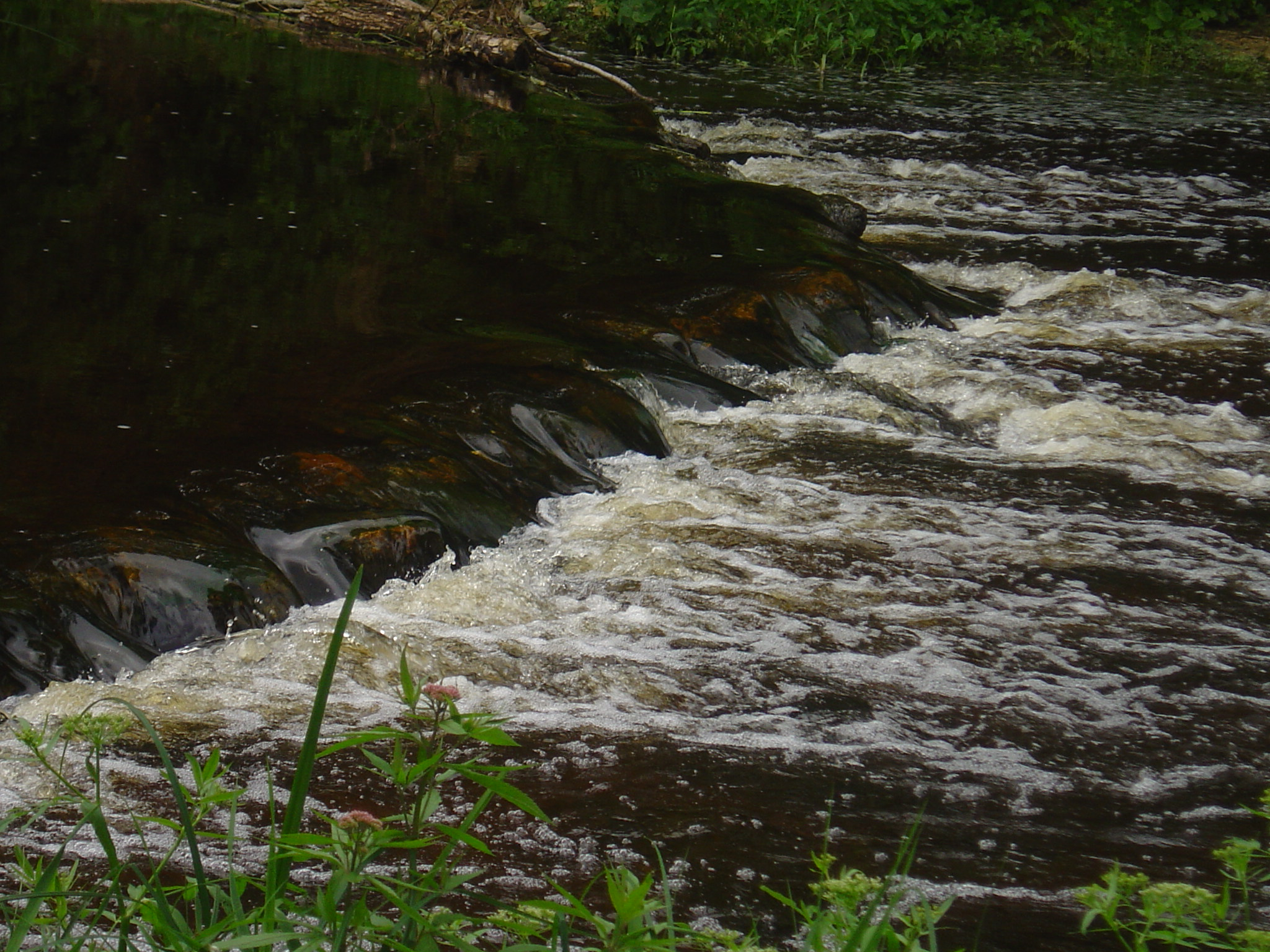 Apaščia